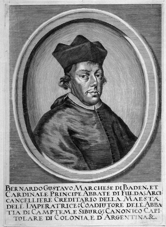 Der Generalmajor im schwedischen Heer und nach seiner Konversion zum Katholizismus Fürstabt in Fulda und Kempten sowie Kardinal Bernhard Gustav von Baden-Durlach (1631-1677)